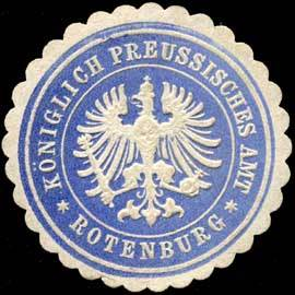 Sealing stamp Title: Königlich Preussisches Amt Rotenburg Description: blau, weiß, geprägt Place: Rotenburg size: 3 cm